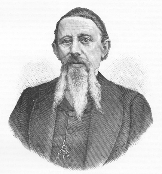 Martín Carrera, President of Mexico, 1855